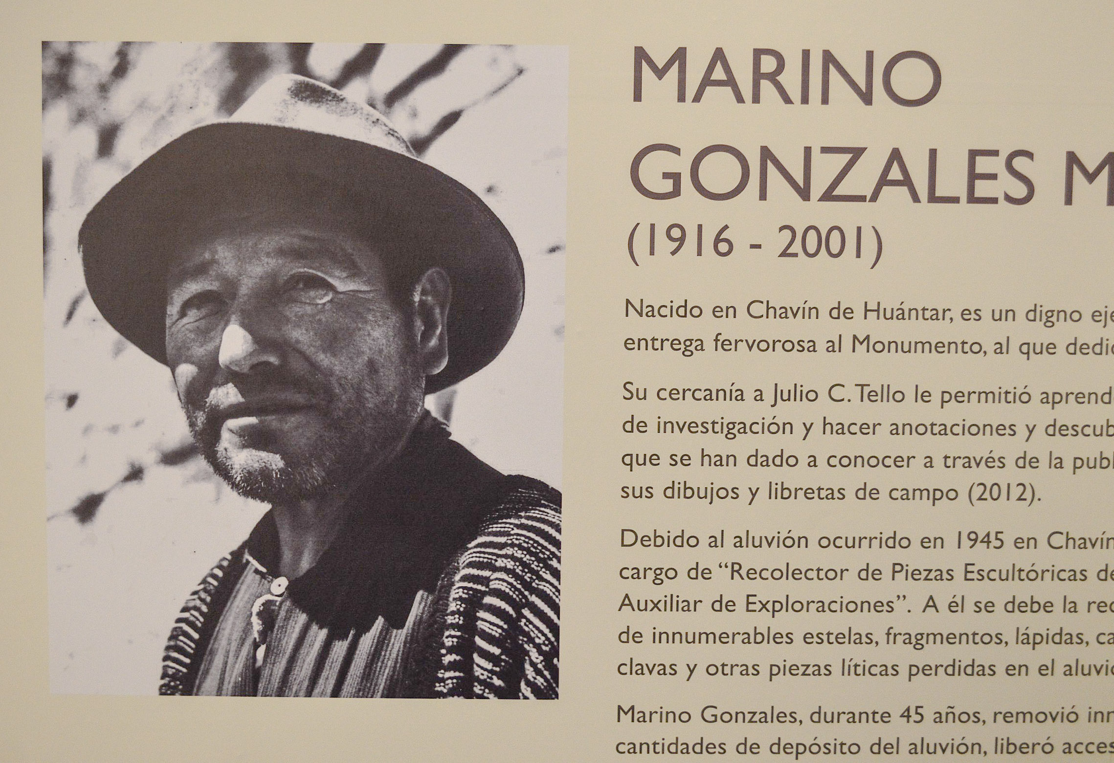 Marino Gonzales Moreno en el Museo Nacional Chavín. Foto tomada en noviembre de 2019.